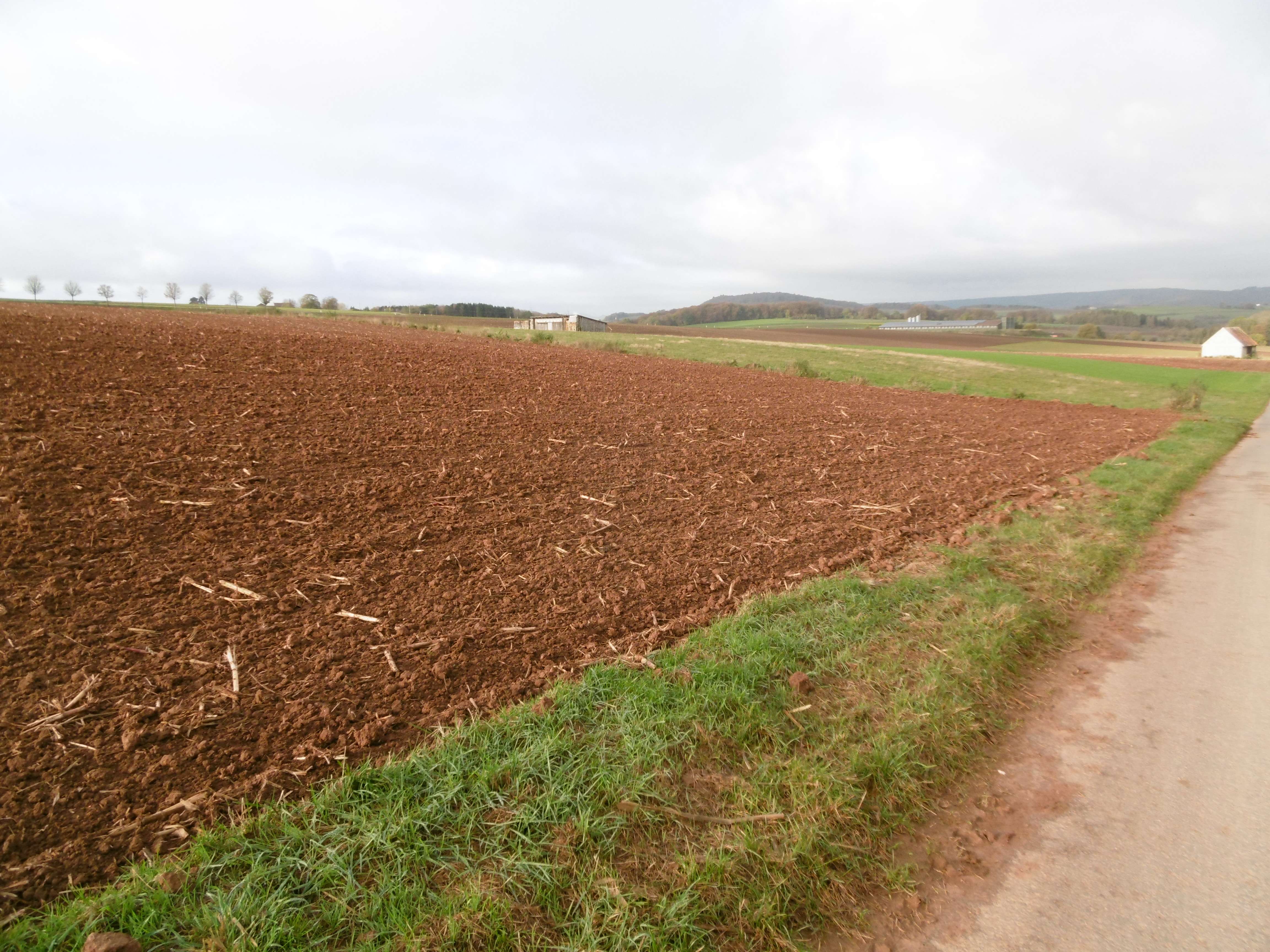 Landschaftsschutzgebiet Echelpohlen vom Nordrand bei LSG Platte.